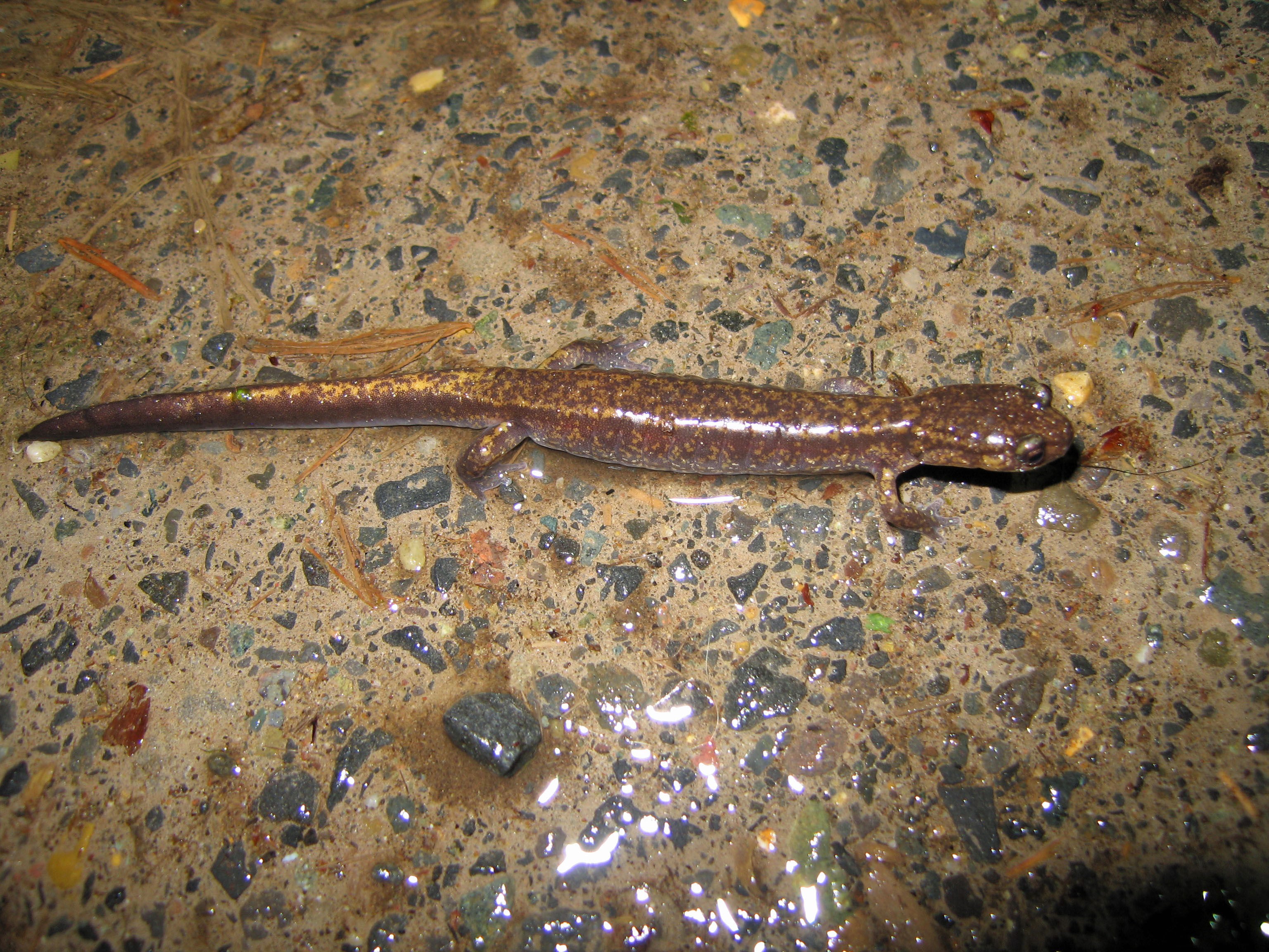 Dunn's Salamander, Plethodon dunni